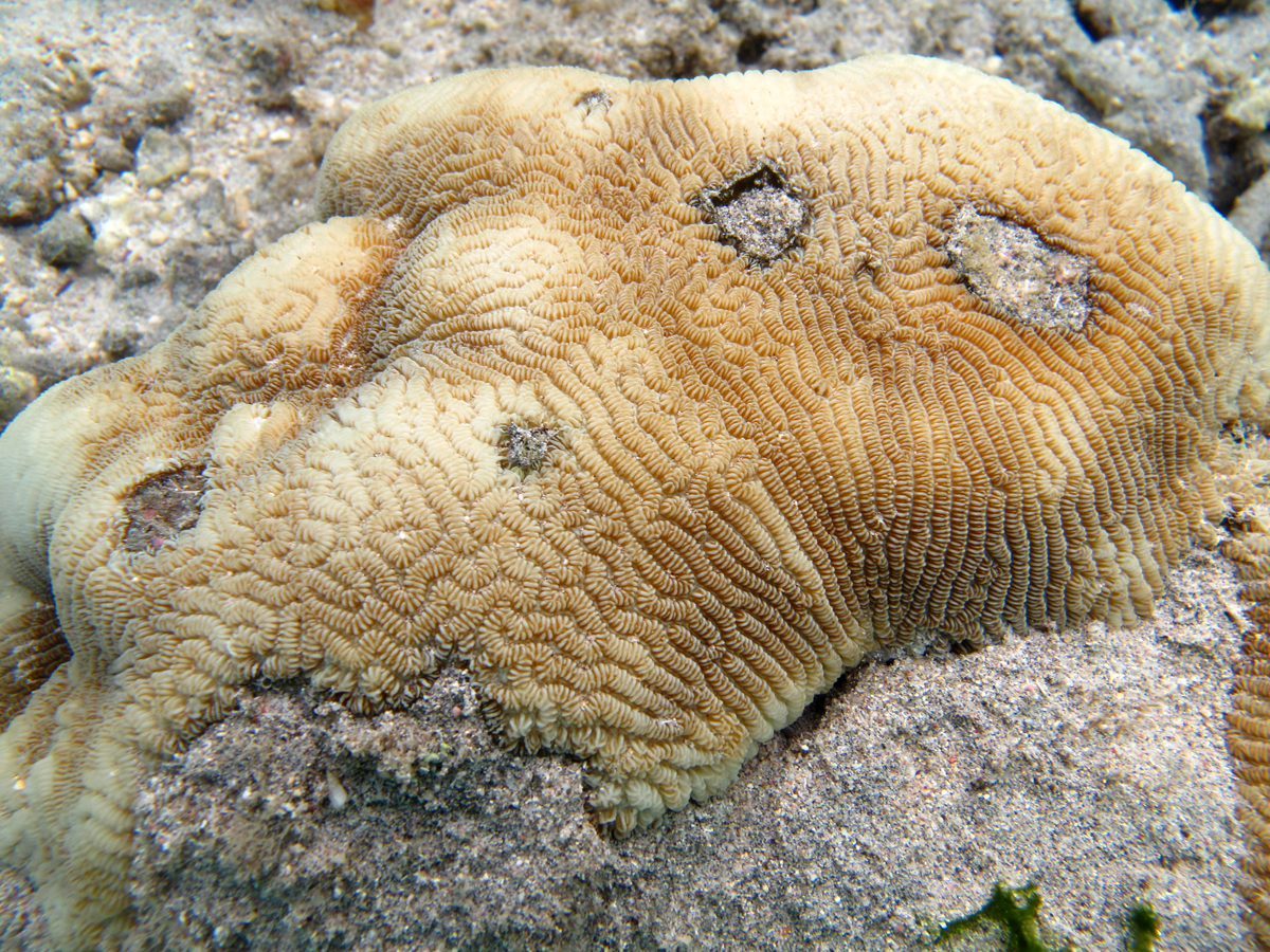 Corail "Maze coral" (Leptoria phrygia) à la Réunion.